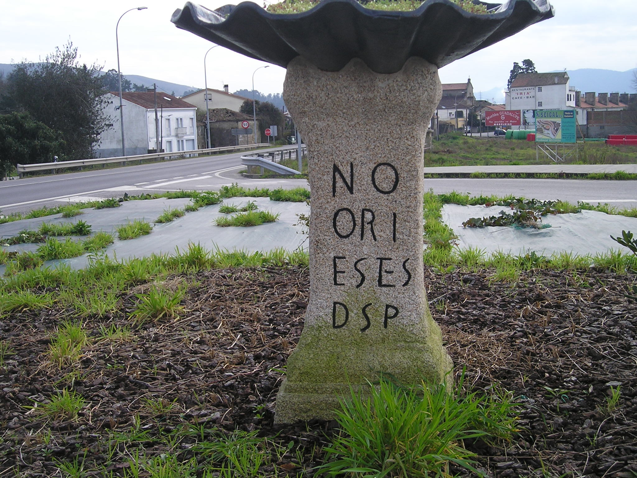 Reproducción actual del Pedrón depositado en la Iglesia de santiago en Padrón (La Coruña, españa), que, según la tradición sirvió de amarradero a la barca que transportó a Hispania los restos mortales del Apostol Santiago. Corresponde con la inscripción CIL II 2540 = 5626 = HEp. 4, 337, cuyo texto se desarrolla como: Nept/uno/ For(o)i(ri)/e(n)ses/ d(e) s(uo) p(osuerunt)